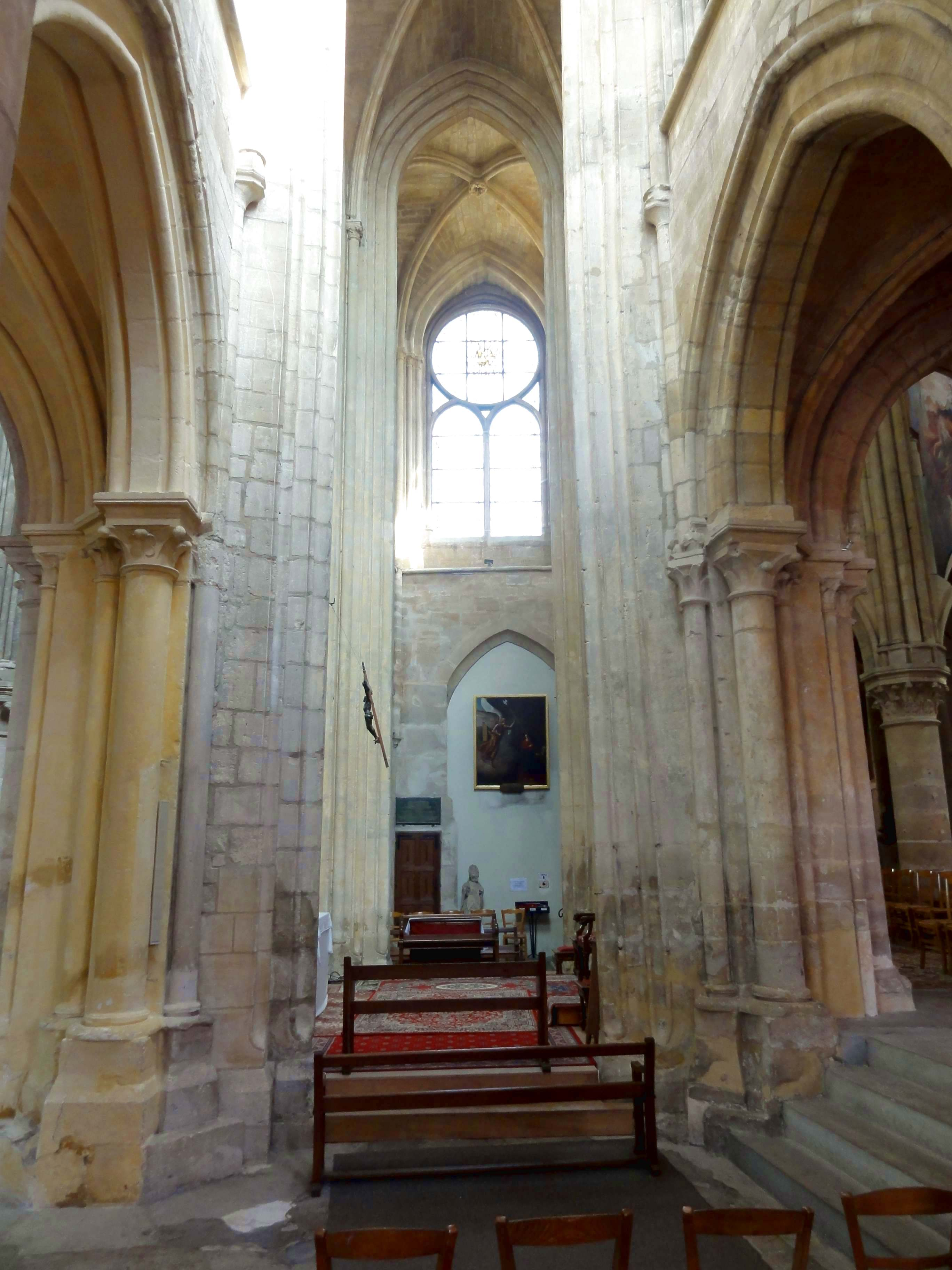 Intérieur de l'église - voir titre.